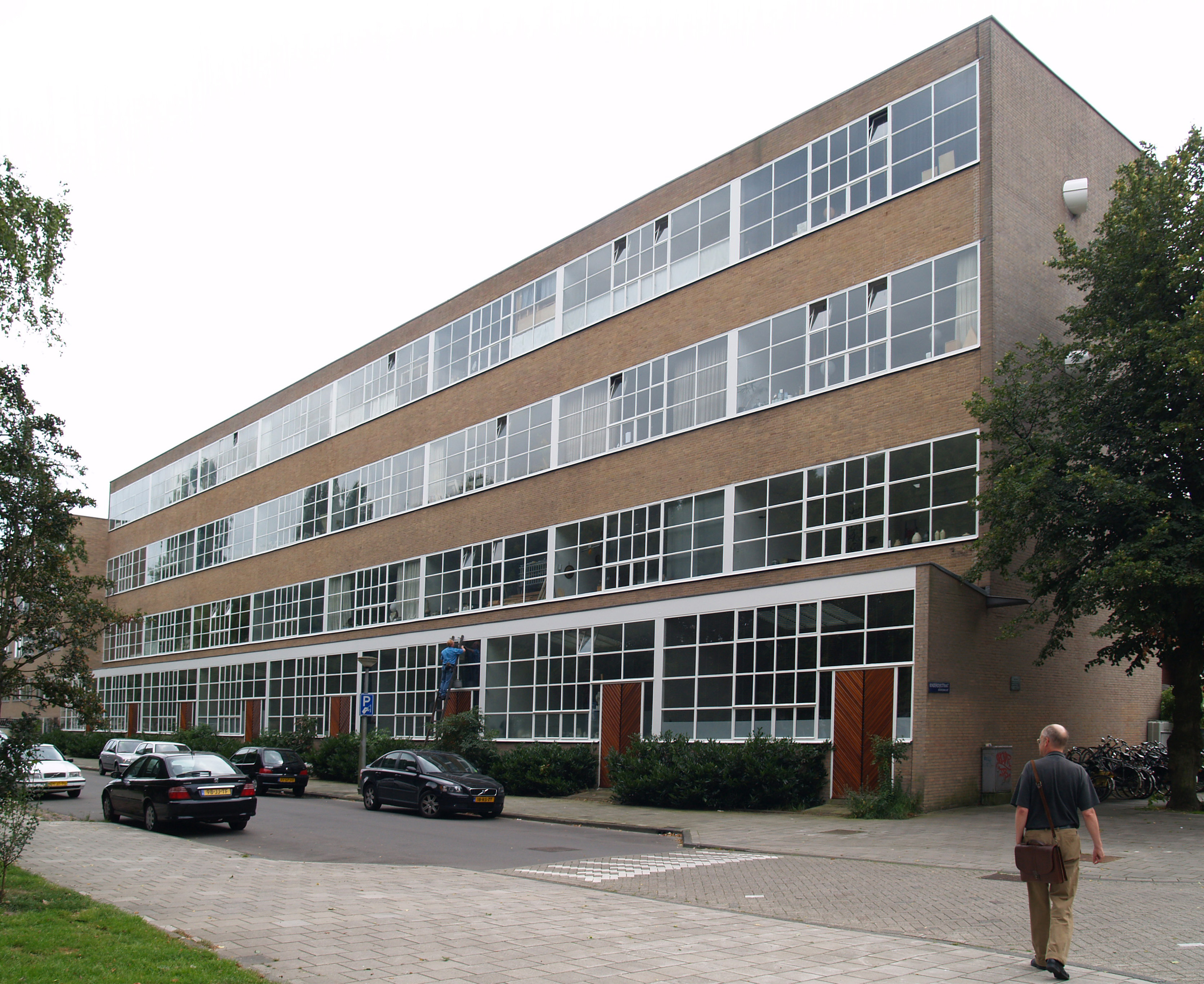 Ateliercomplex Noordzijde